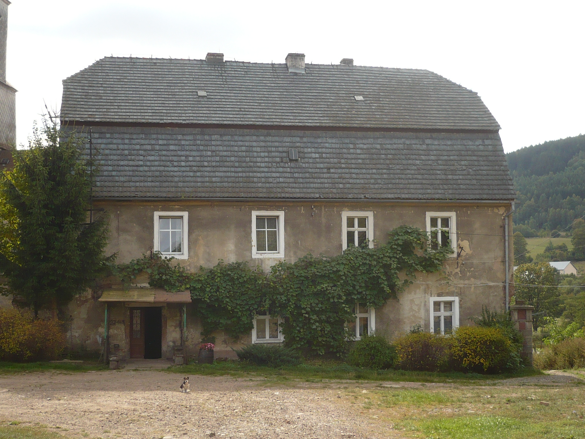 Sarny.